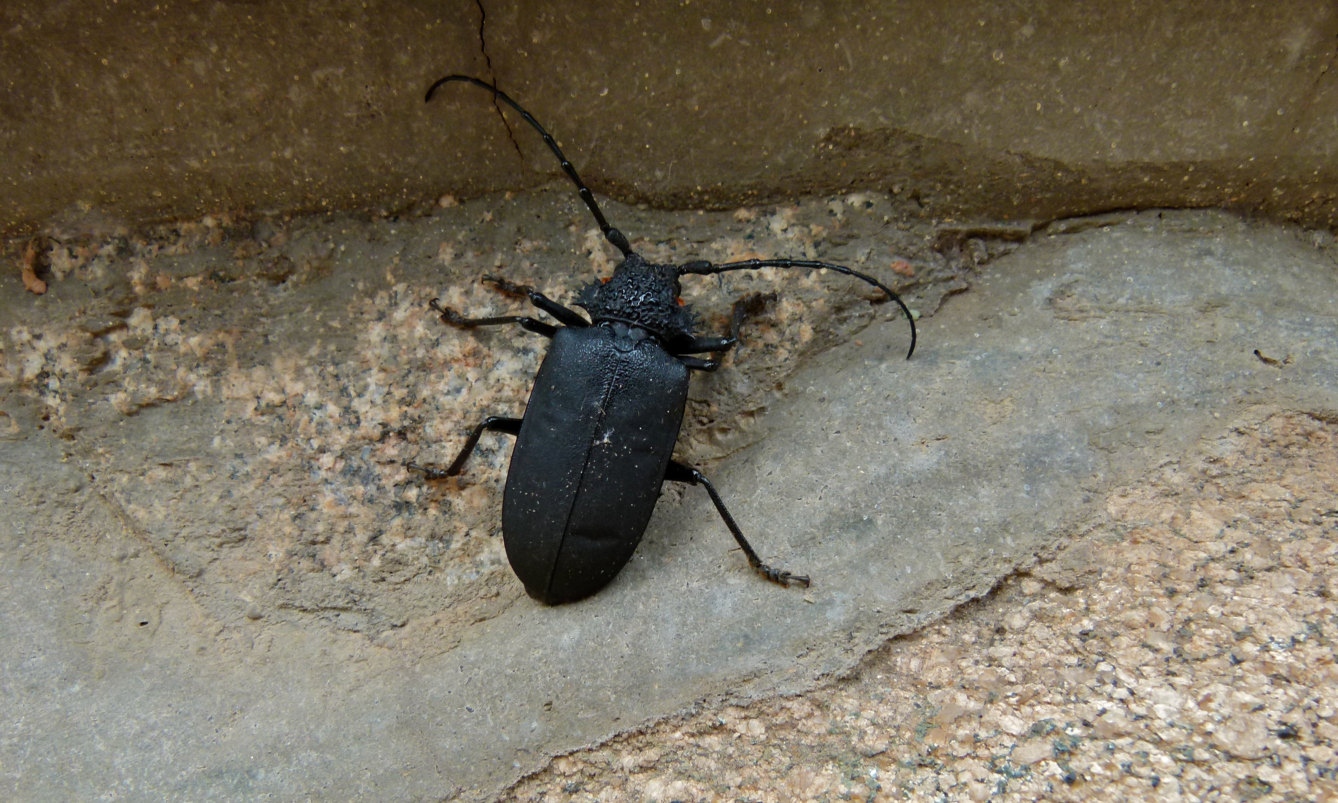 Skukuza Camp, Kruger NP, SOUTH AFRICA